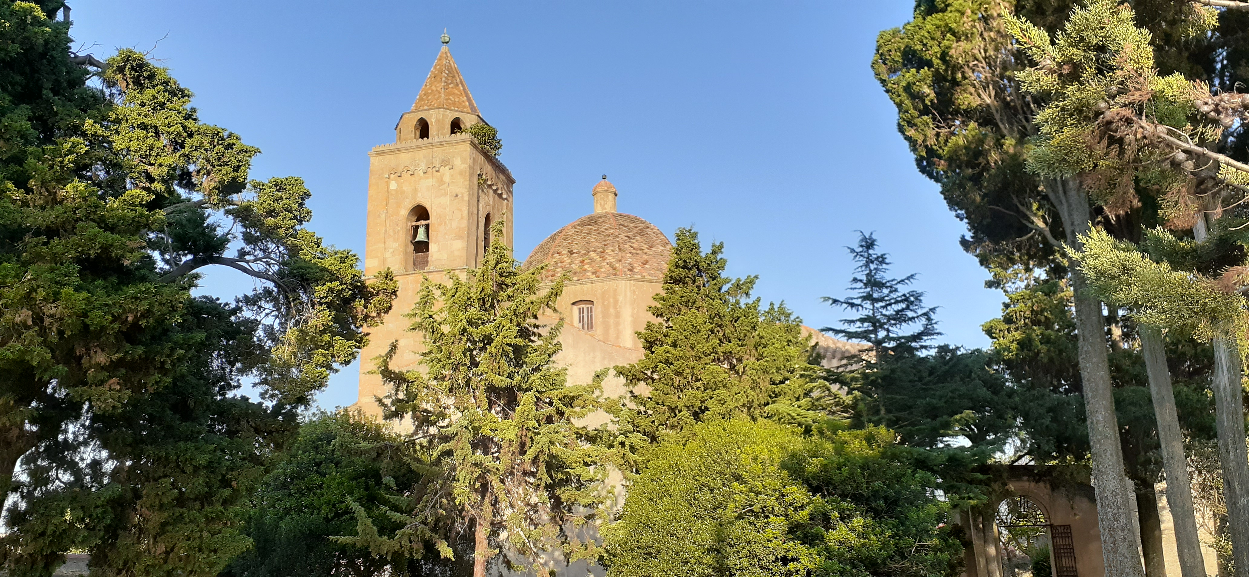 Chiesa di San Lorenzo in Villanovafranca